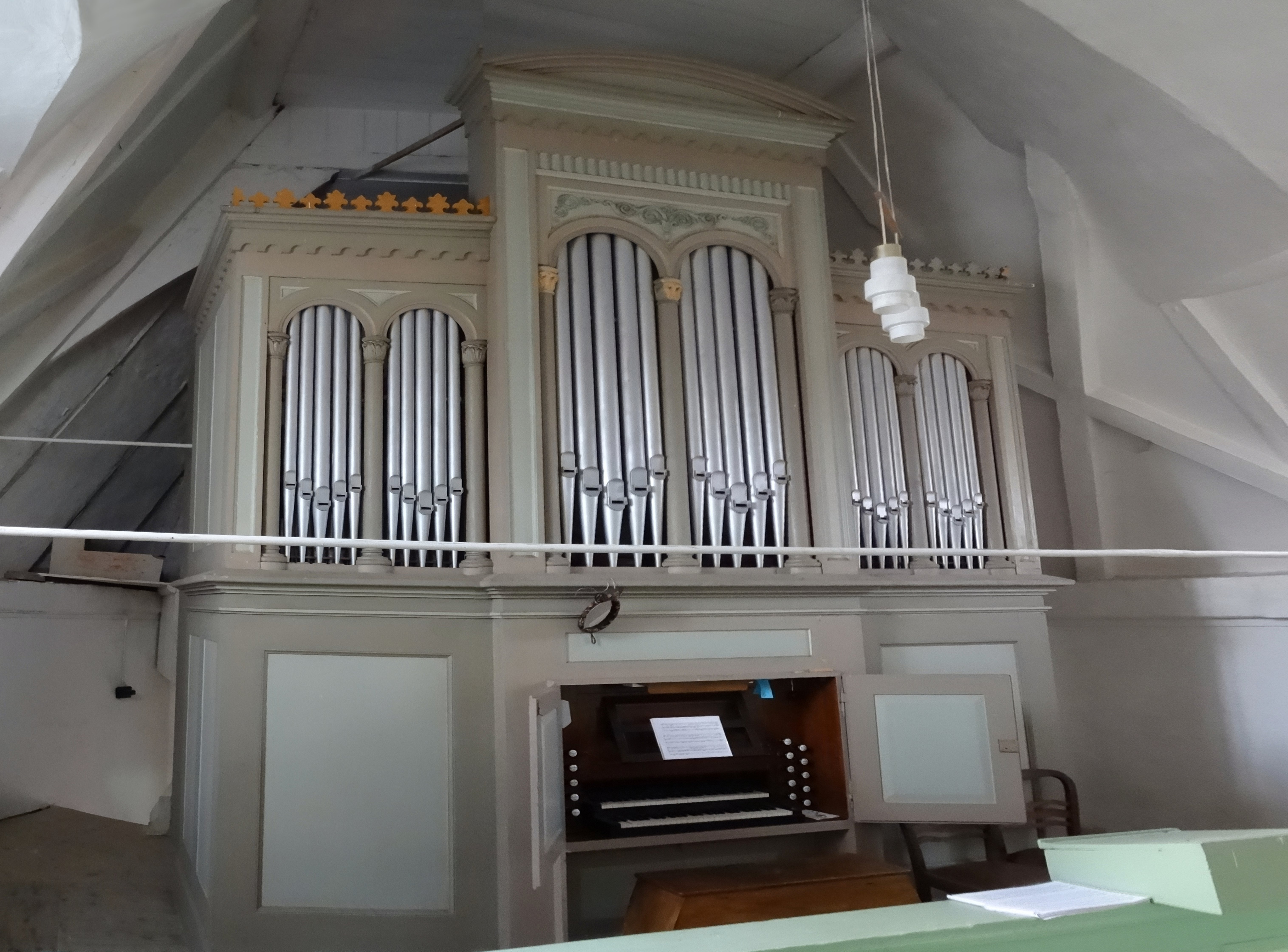 Rühlmann-Orgel St. Michael Großleinungen (1876)